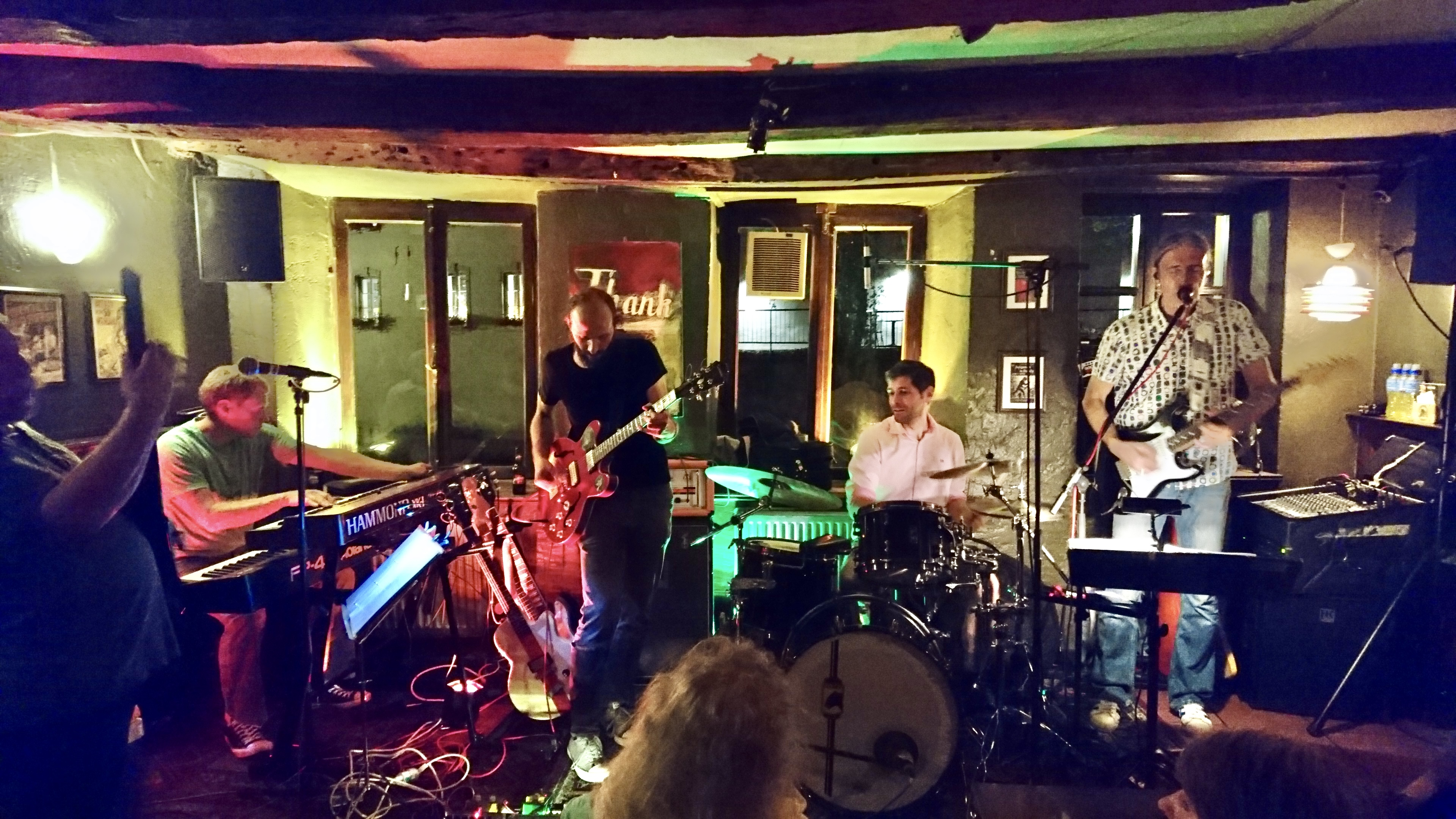 Déi lëtzebuergesch Bluesgrupp Gaasserockbluesband den 12. Juli 2018 an der Stad Lëtzebuerg